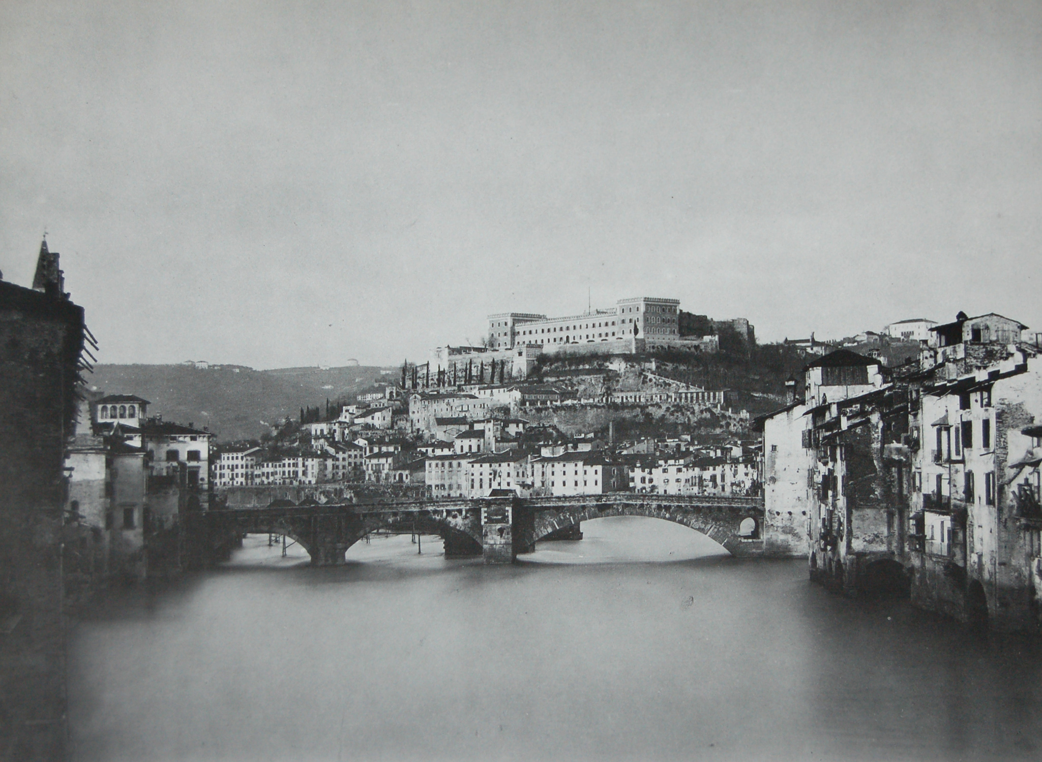 Colle San Pietro a Verona. Foto di Moritz Lotze.